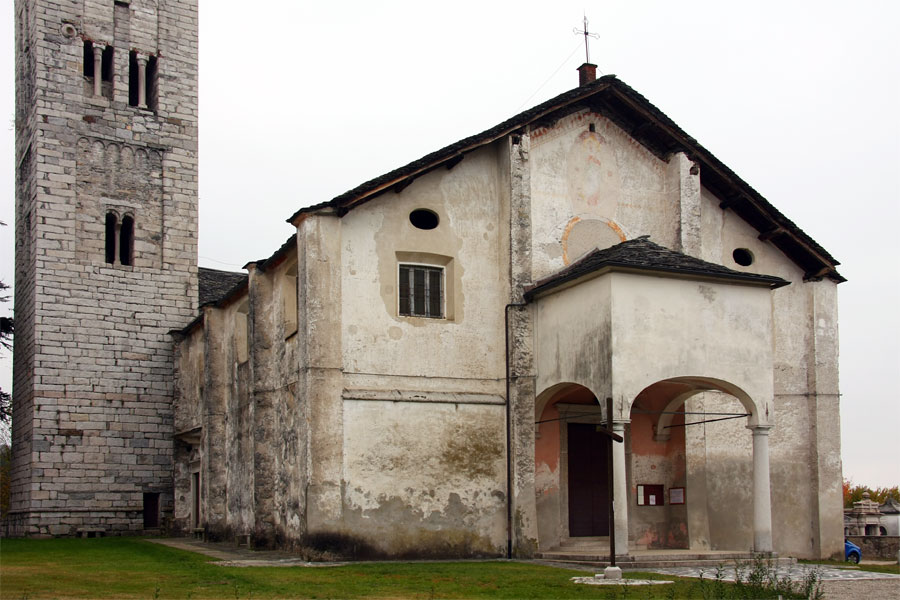 Chiesa Parrocchiale di Santa Maria Assunta ad Ameno (NO)